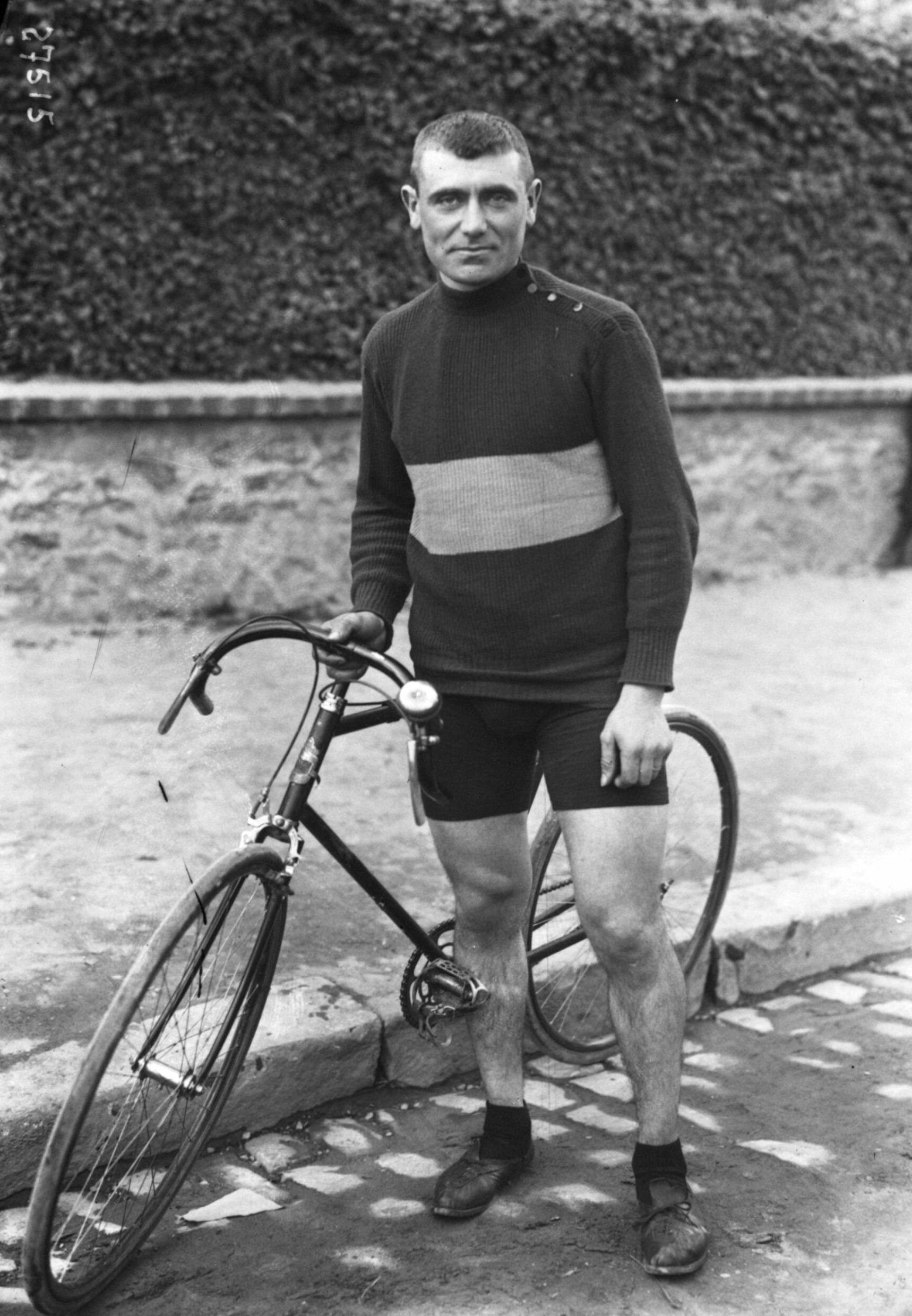 Eugène Christophe portrait du coureur cycliste avant le départ